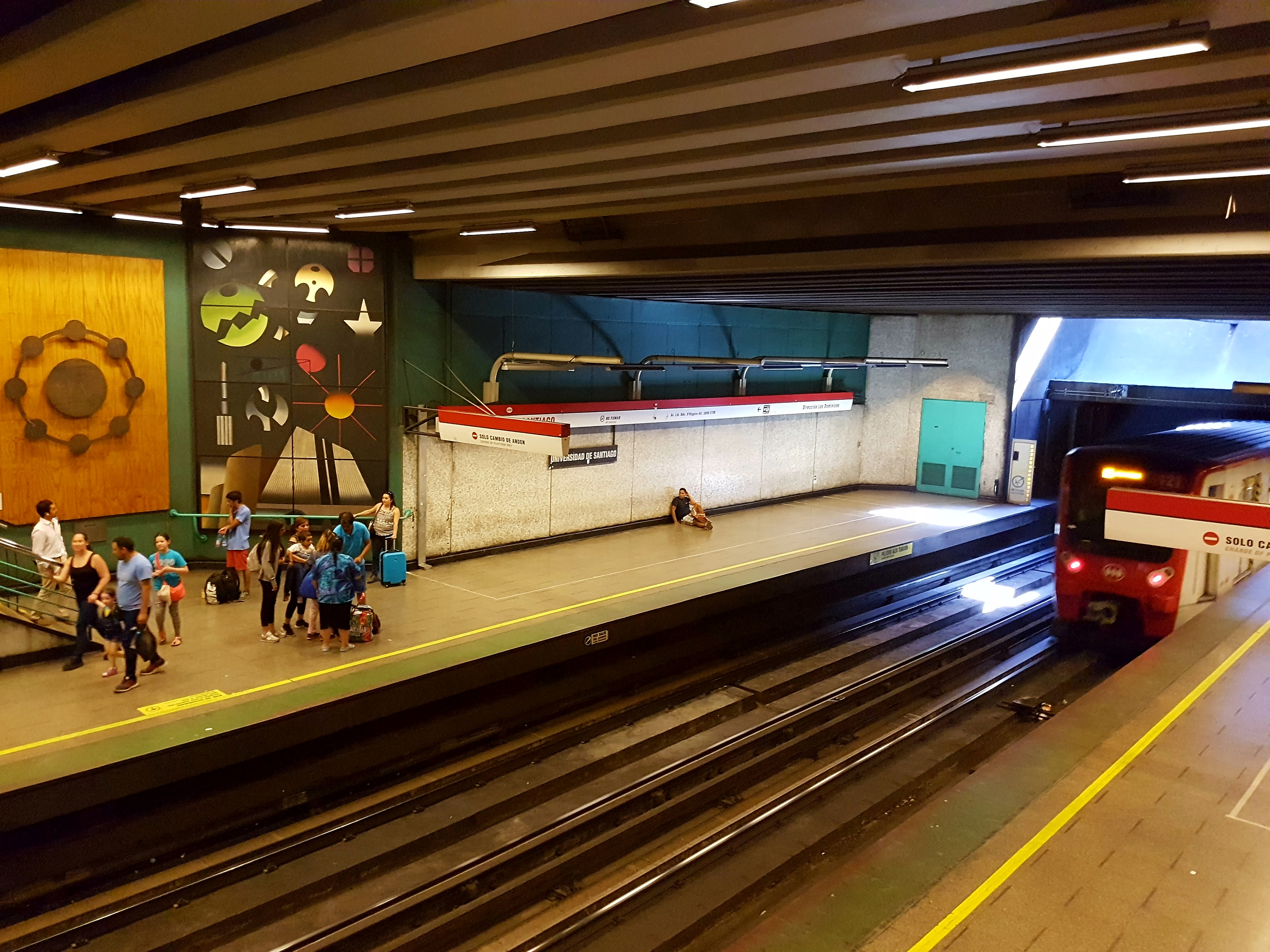 Un tren llegando al metro Universidad de Santiago. La estación está adornada con murales sobre la historia de la casa de estudios del mismo nombre, obra del pintor chileno Alberto Ludwig.